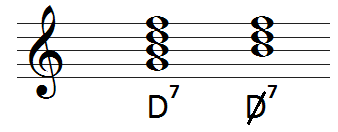 Bsp. und Bildung eines verkürzten Dominantseptakkords (über dem Grundton G)